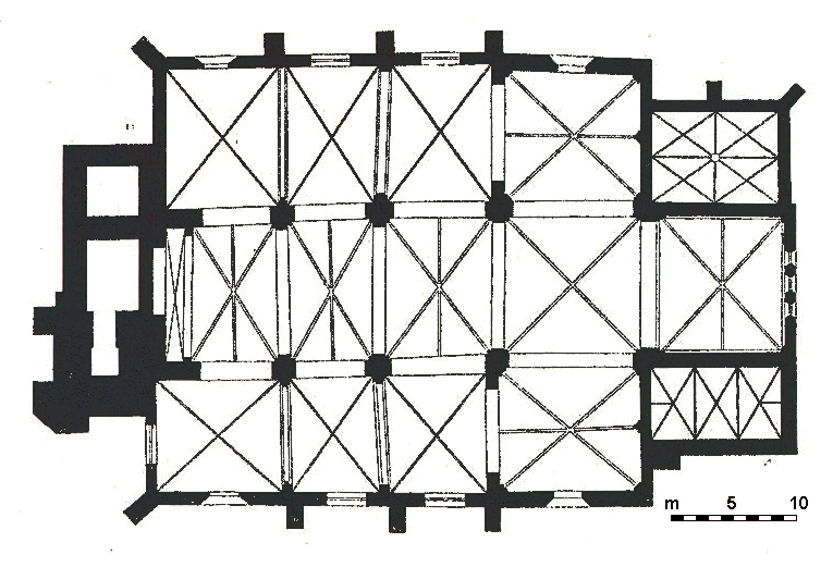 Grundriss der Stephanikirche in Bremen vom Umbau zur spätgotischen Pseudobasilika im 14. Jahrhundert bis zum 1888 bis 1891 erfolgten Umbau zur neo-romanisch-frühgotischen Basilika